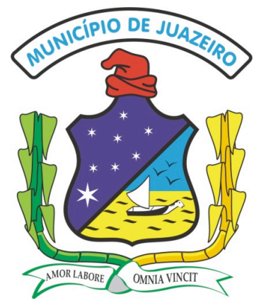 Brasão de Juazeiro-BA